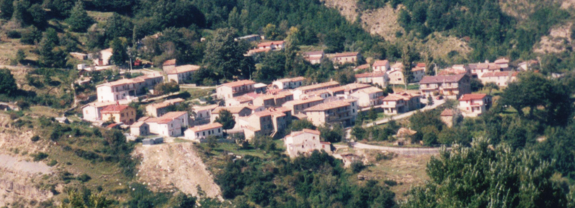 Panoramica di Alvi